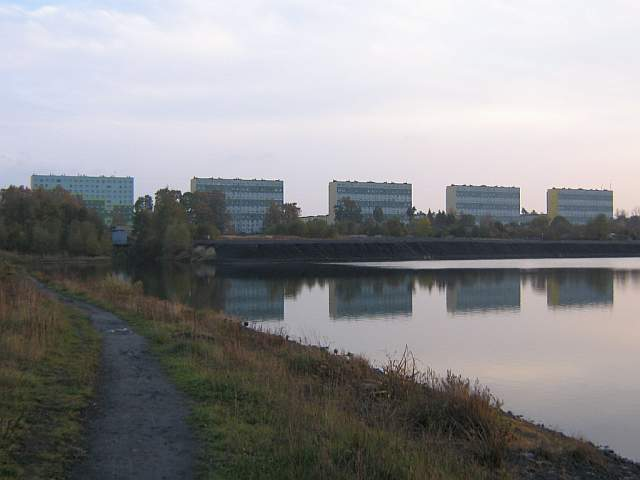 Wieżowce przy al.Piastów w Szczygłowicach